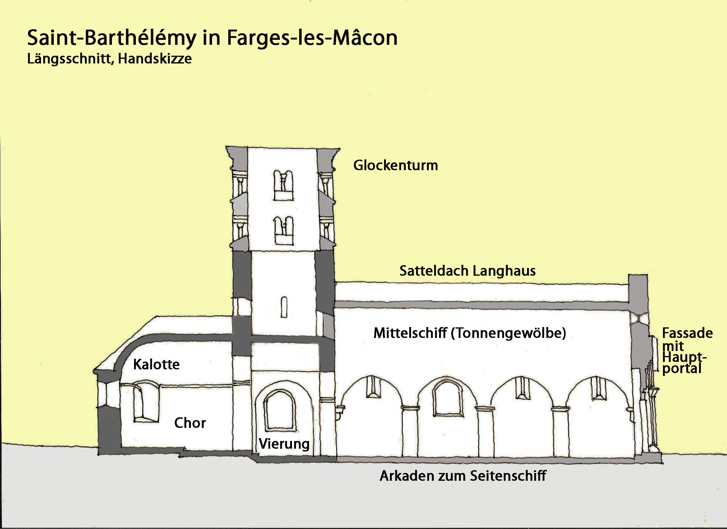 St-Barthélémy,_Farges,_Längsschnitt